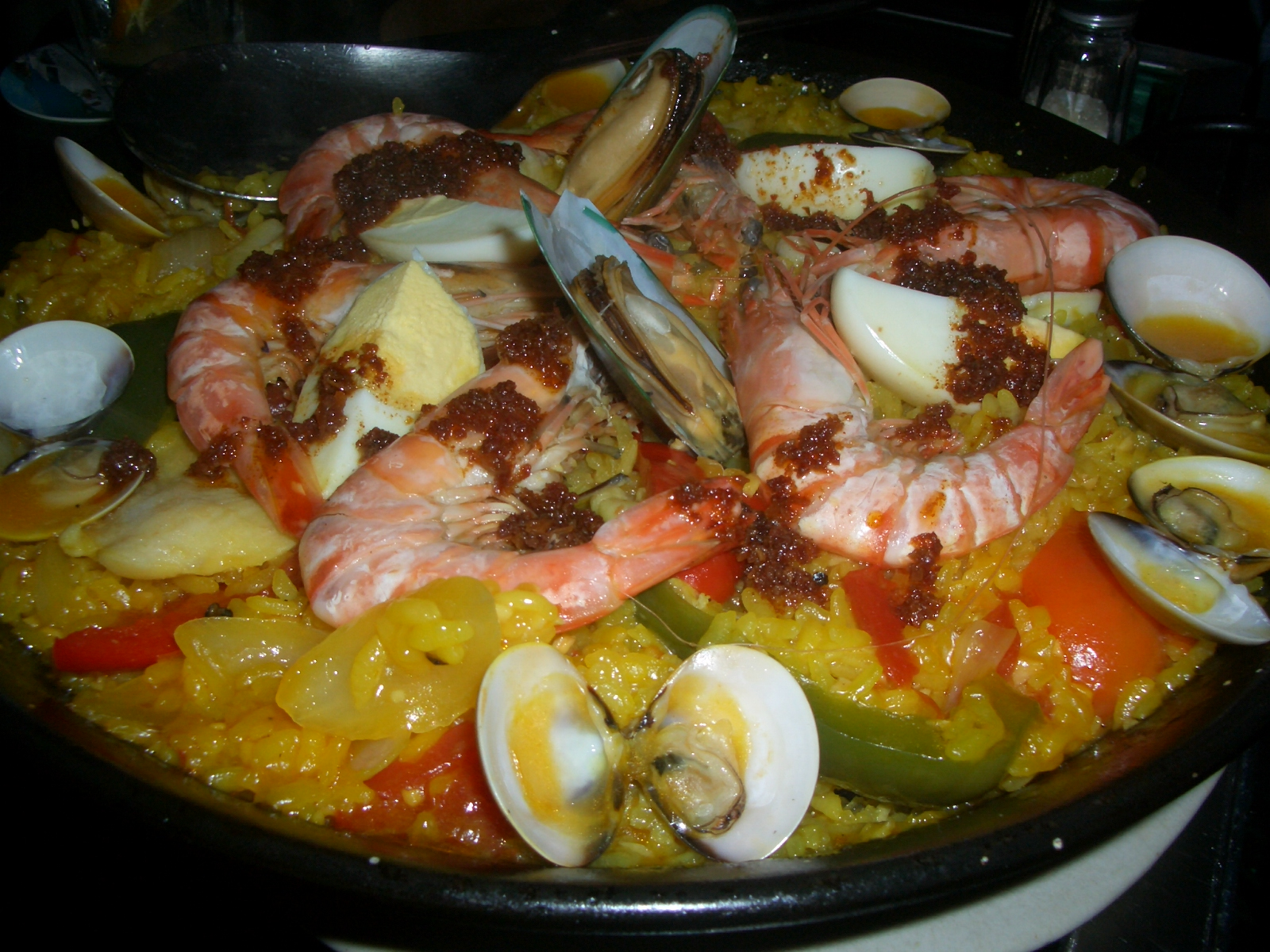 Paella